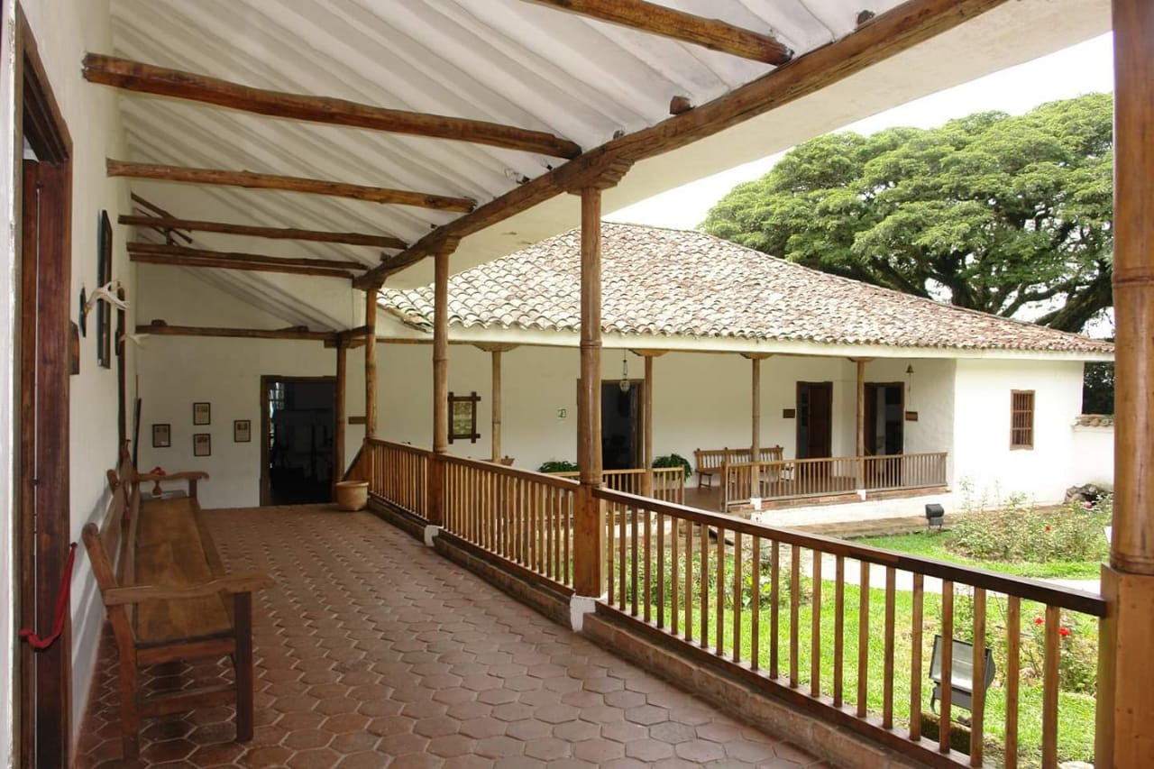 este lugar inspiró Jorge Isaacs a escribir la maria Esta fotografía fue tomada en un área protegida de Colombia con el código 76248 del RUNAP.